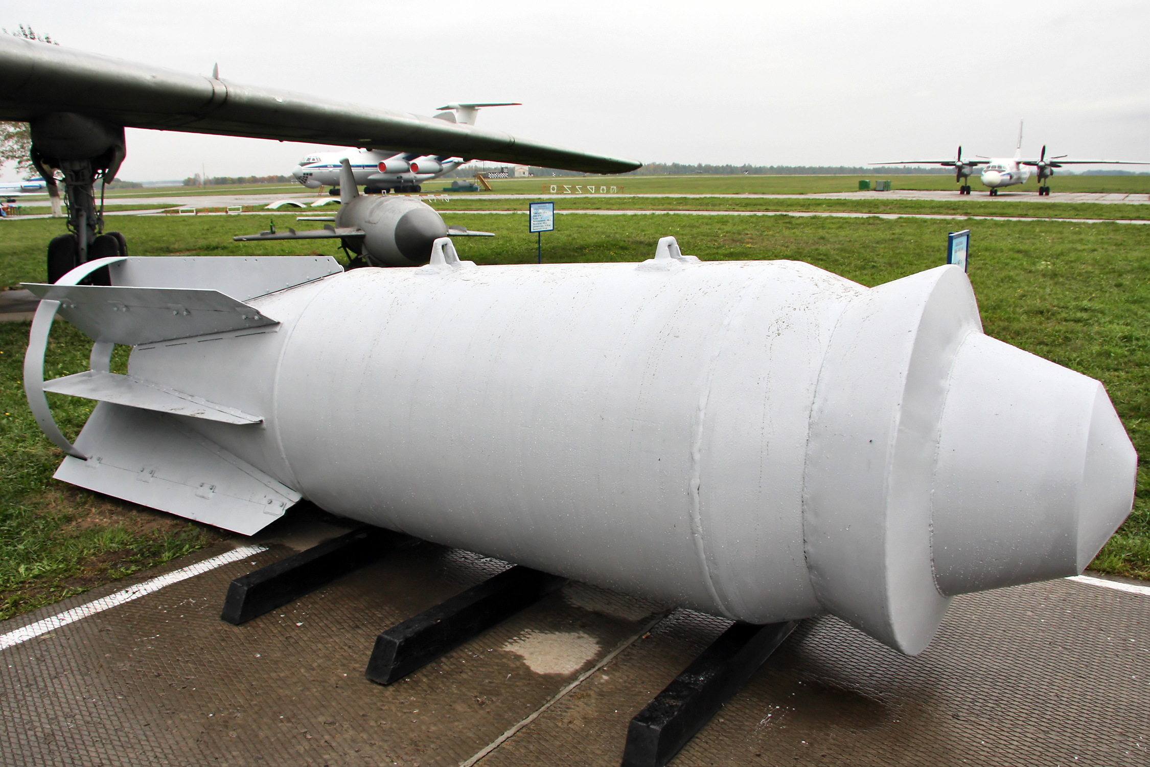 Авиабомба ФАБ-9000 М-54 (FAB-9000 M-54 aerial bomb)